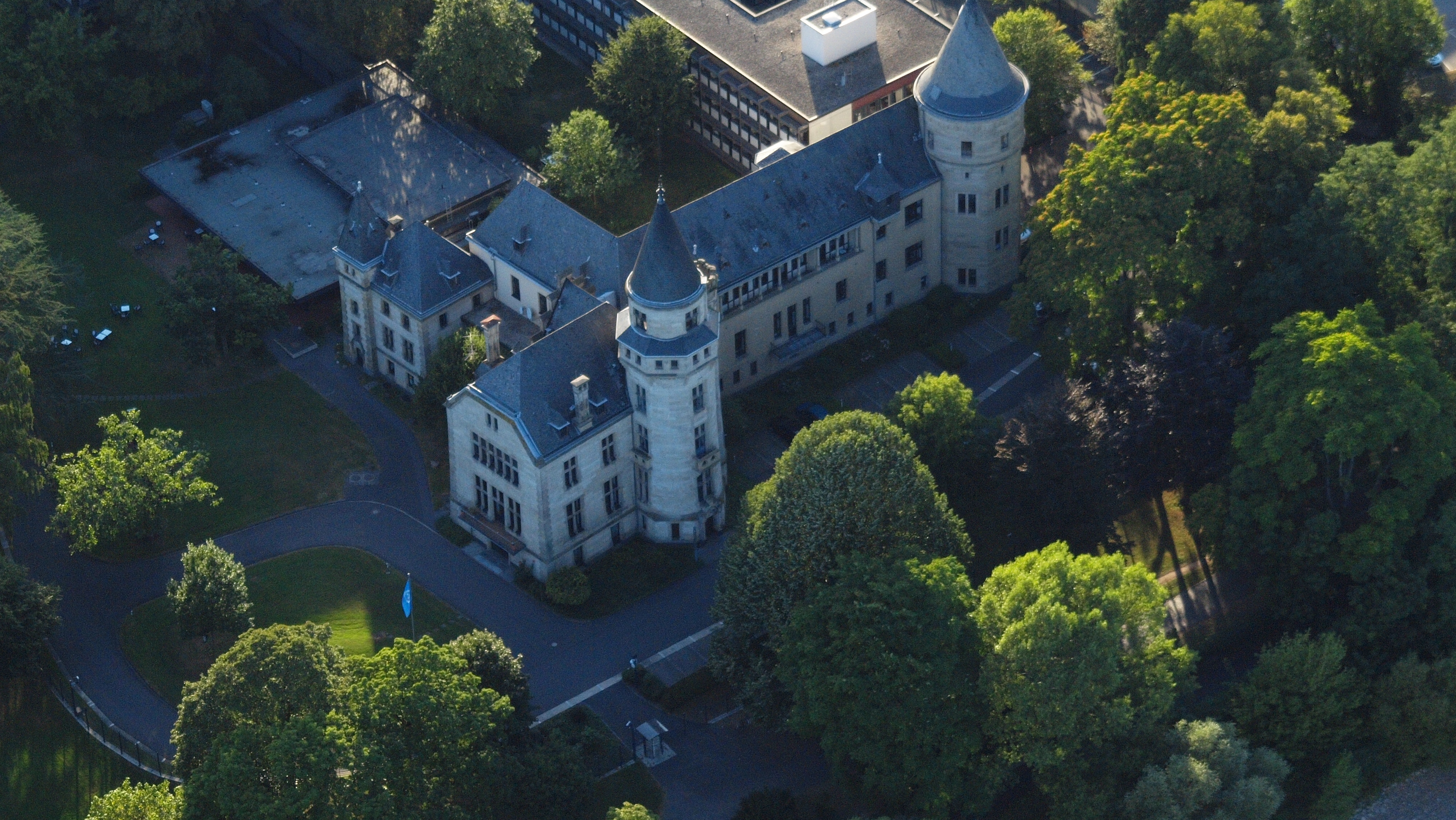 Haus Carstanjen, Bad Godesberg, Bonn: Luftaufnahme